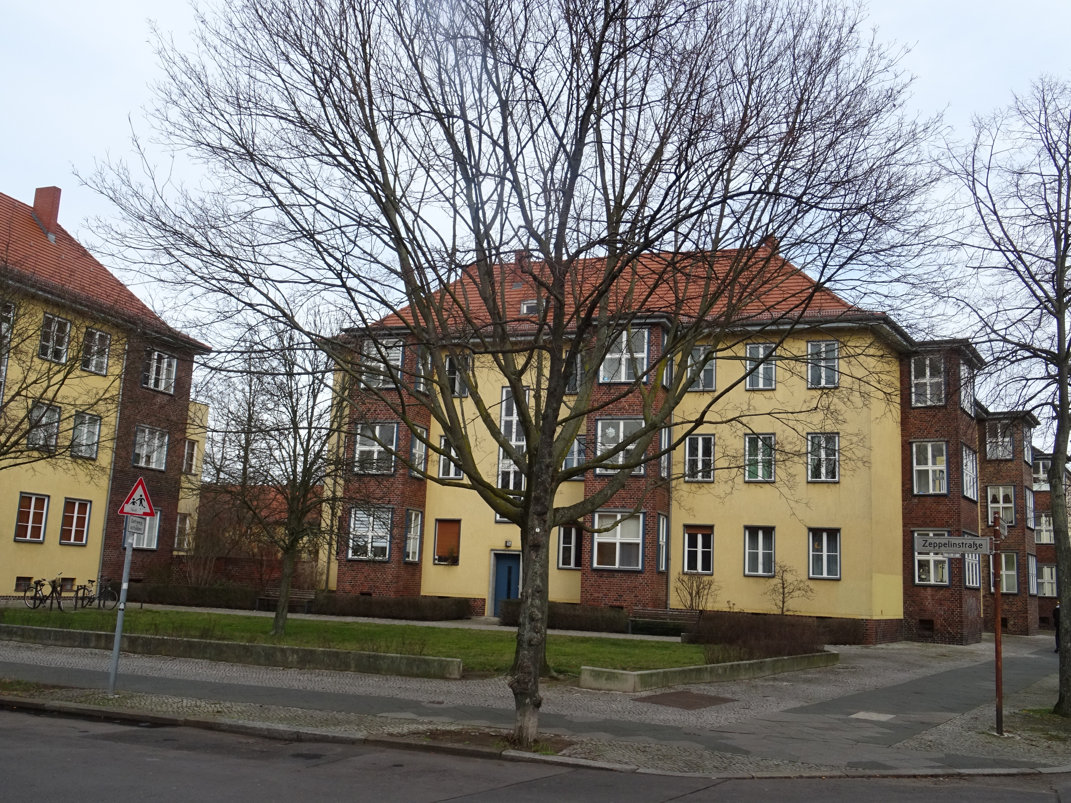 Berlin-Oberschöneweide, denkmalgeschützte GEBAG-Siedlung,Ecke Zeppelin/Trinniusstraße